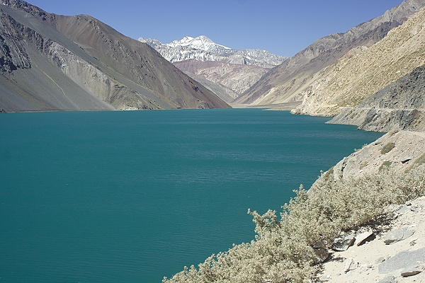 Embalse El Yeso en verano, al oriente de Santiago, Chile.